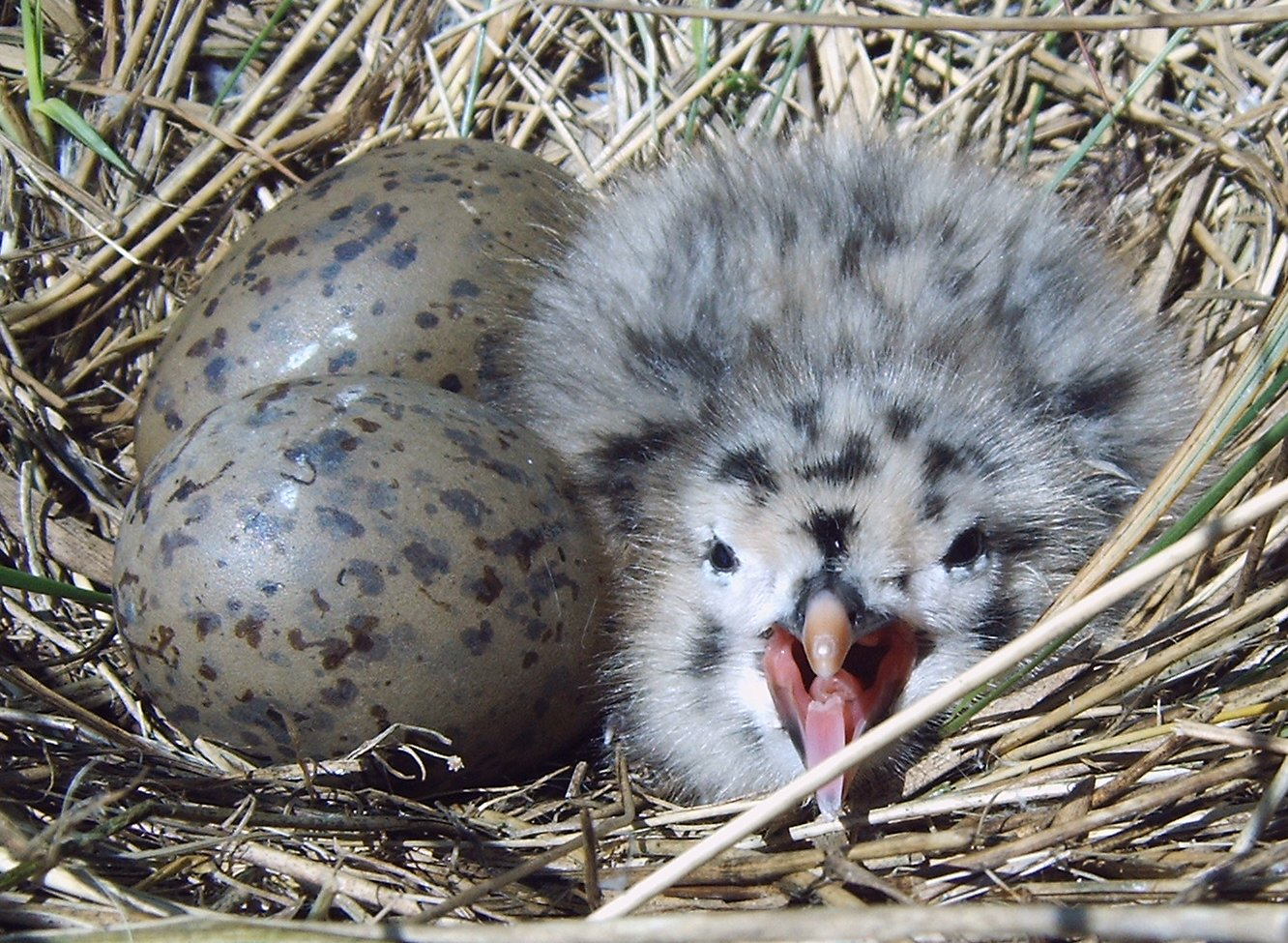 Junge Silbermöwe